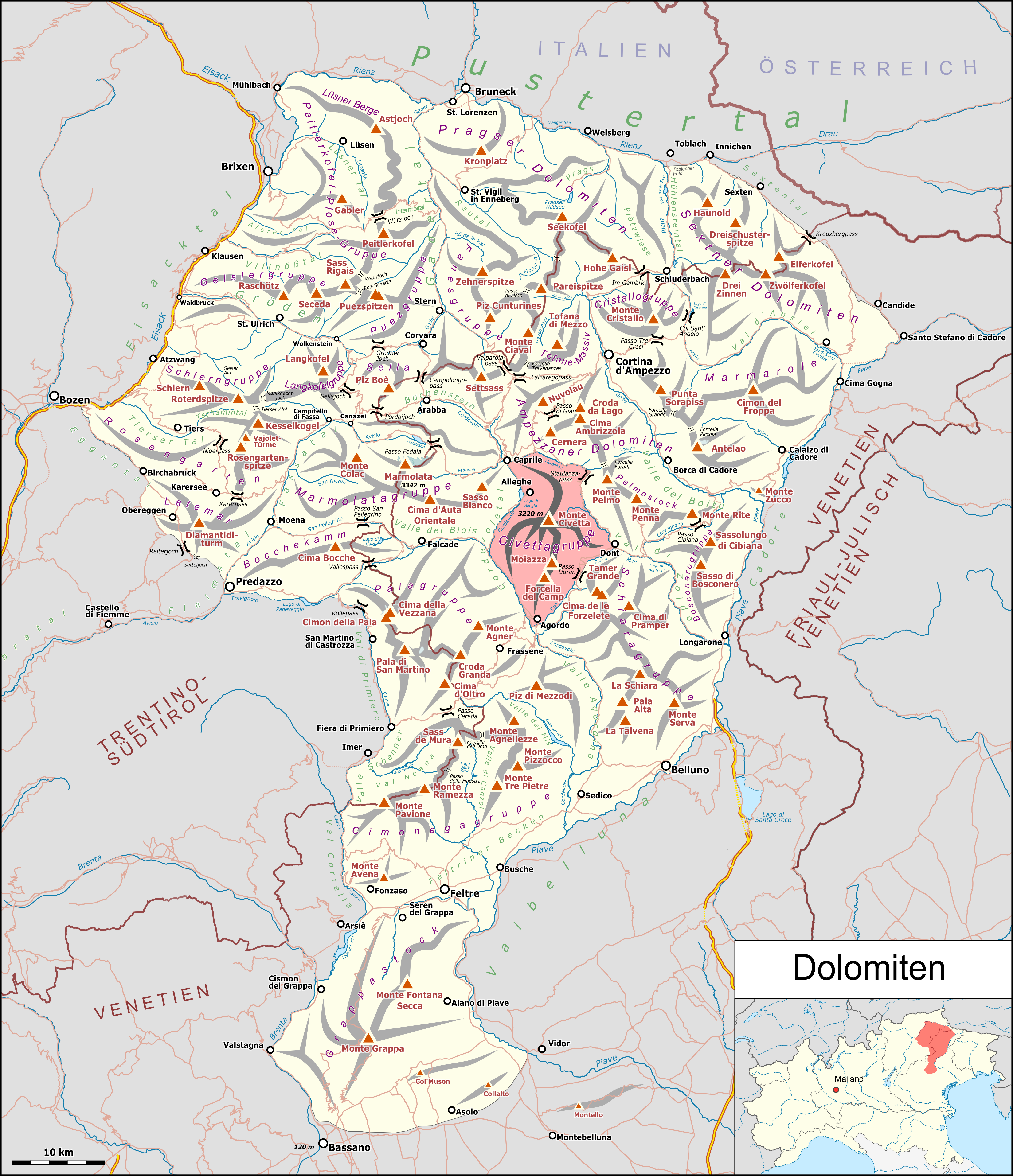 Lagekarte der Civettagruppe in den Dolomiten.